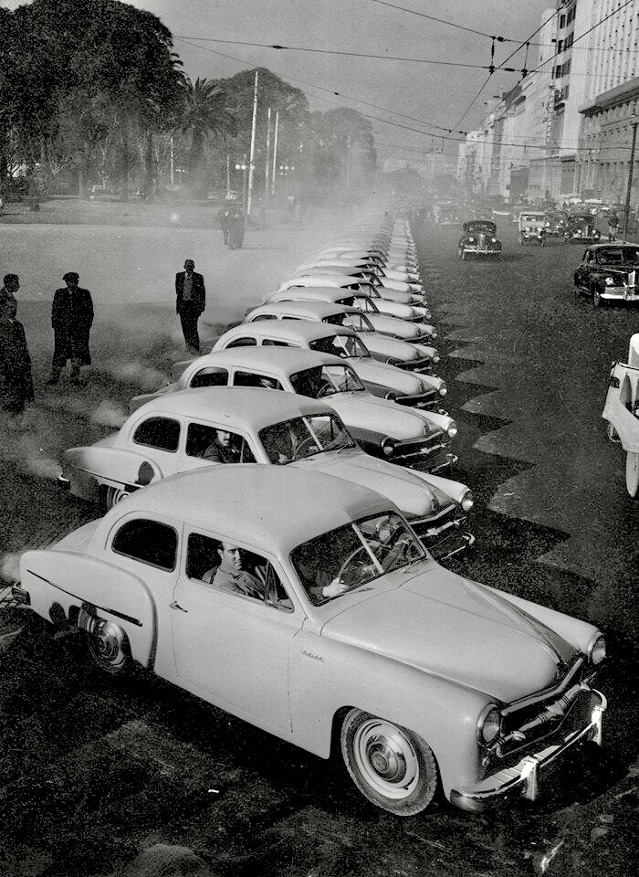 Sedán Justicialista, año 1954. Inventario 208913 General Archive of the Nation Native nameArchivo General de la Nación ArgentinaLocationBuenos Aires, ArgentinaCoordinates34° 36′ 17″ S, 58° 22′ 14″ W Established28 August 1821Web pageAGNAuthority control : Q2860529 ISNI: 0000 0001 2375 5869 institution QS:P195,Q2860529 This file, was provided to Wikimedia Commonsthanks to an agreement between the General Archive of the Nation of Argentina and Wikimedia Argentina.